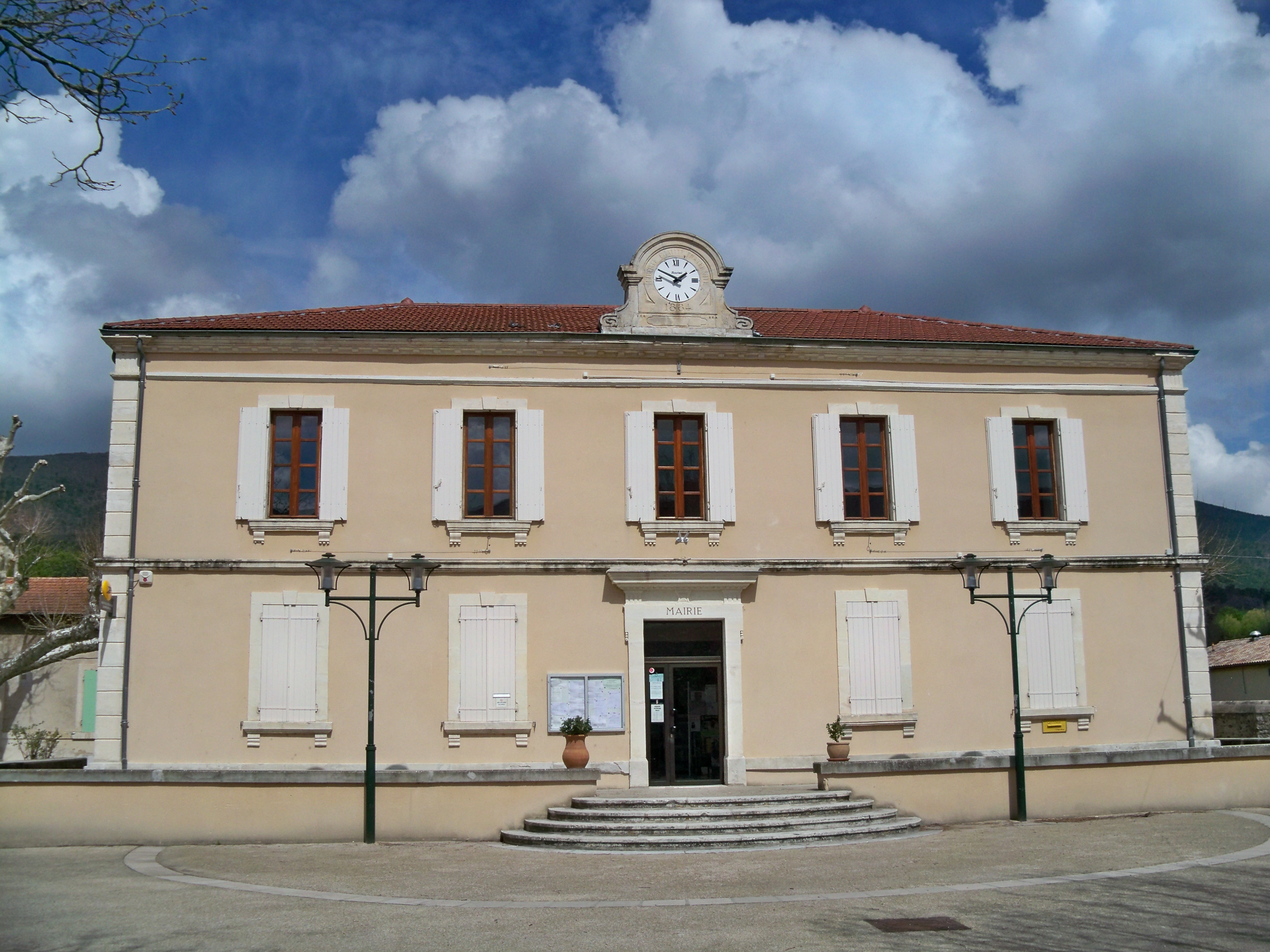 Mairie de Le Poët-Laval (26)